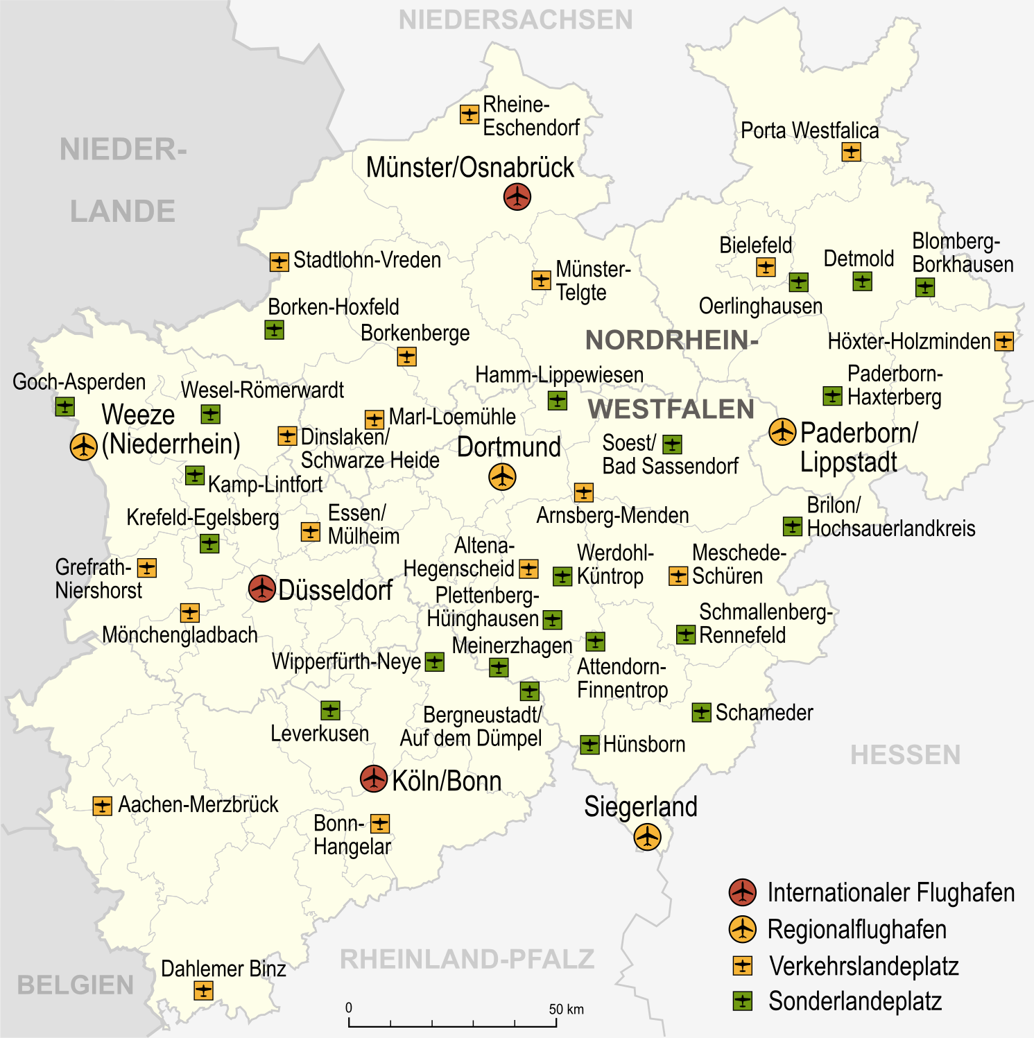 Flughäfen, Verkehrslandeplätze, Sonderlandeplätze und Wasserlandeplätze in Nordrhein-Westfalen, Stand 2007